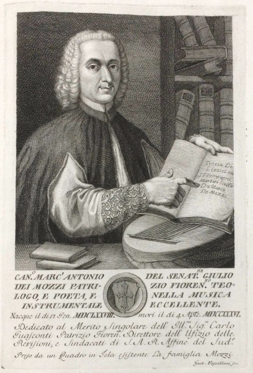 Marco Antonio de Mozz